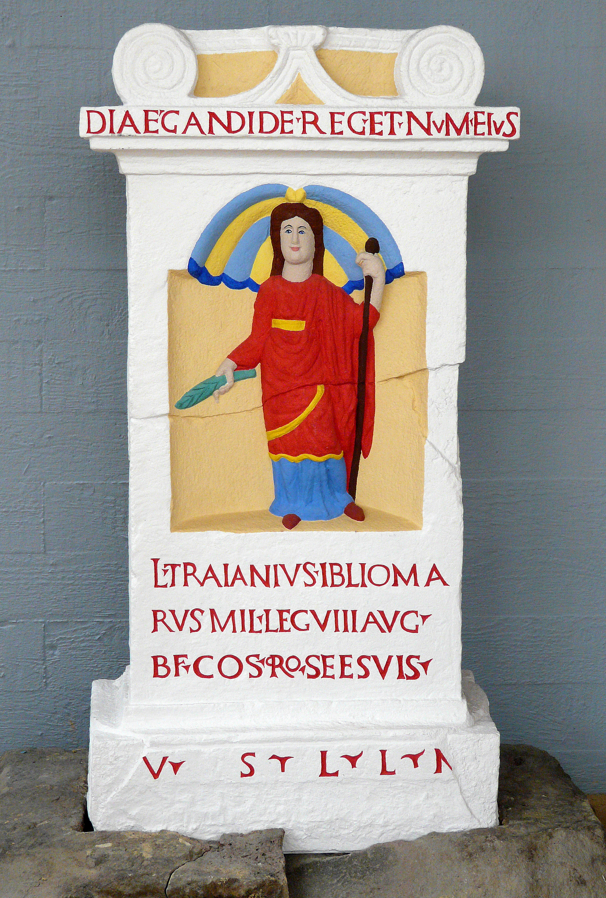 Weihestein aus dem Benefiziarier-Weihebezirk des Kastells Osterburken, Aufbewahrungsort: Römermuseum Osterburken, AE 1986, 00695